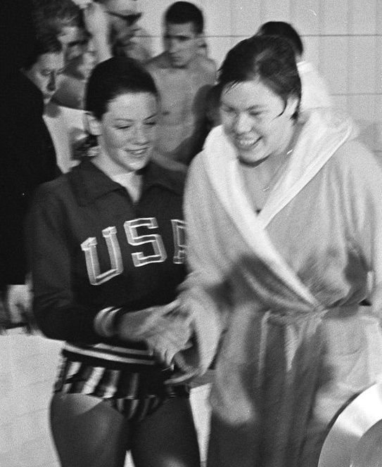 Claudia Kolb (left), Klenie Bimolt